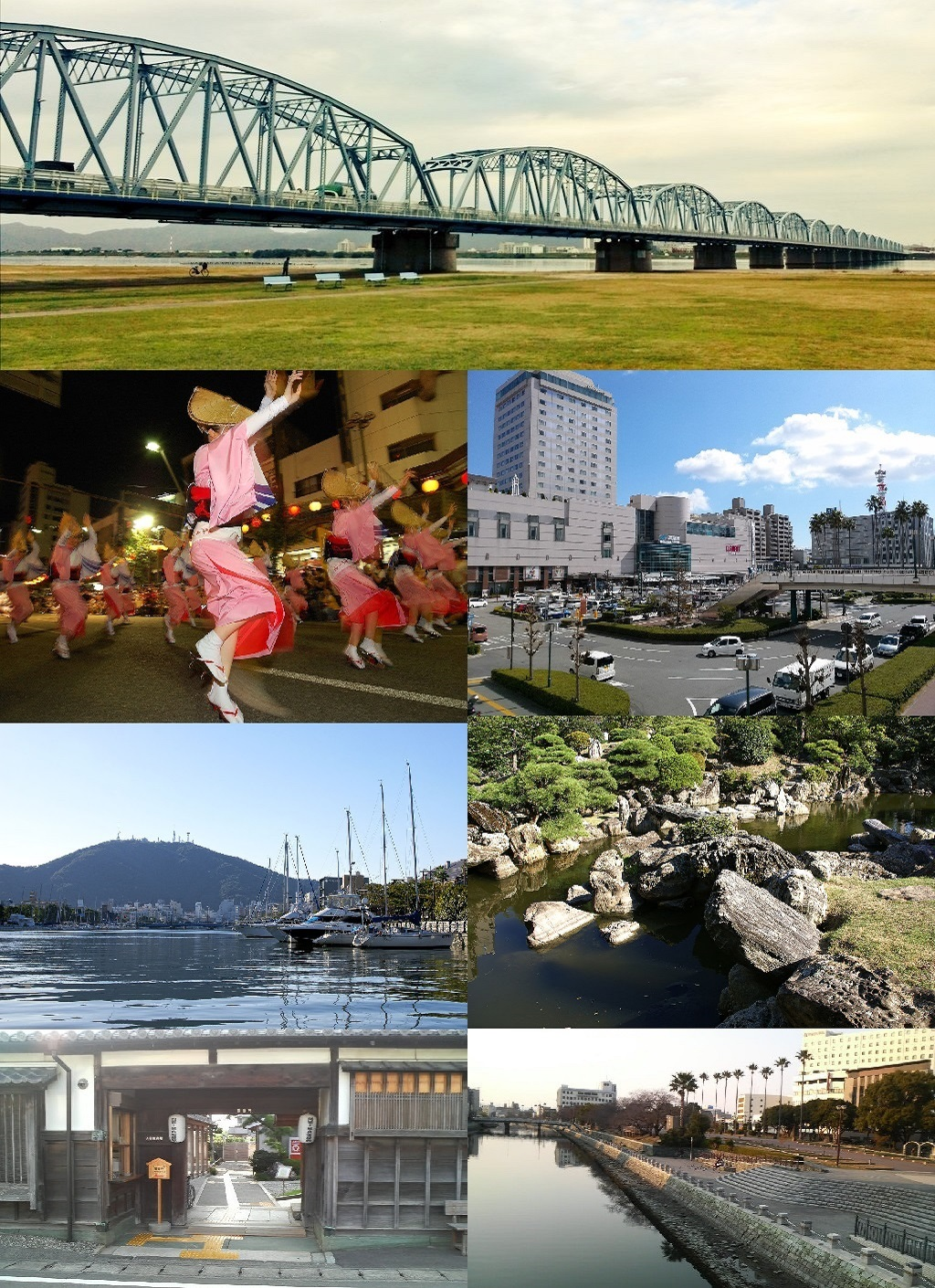 徳島県徳島市のモンタージュ。